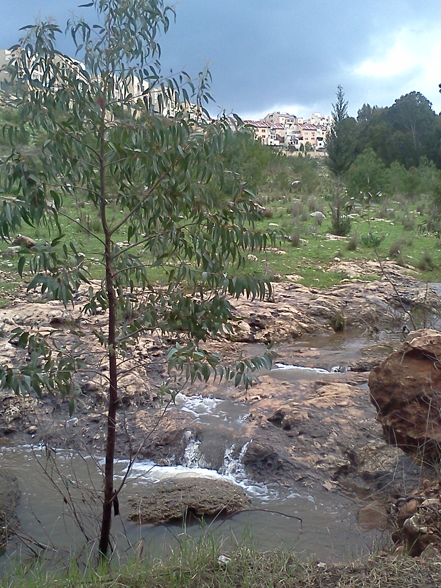 חלקו התיכון של נחל מזור, ברקע העיר אלעד